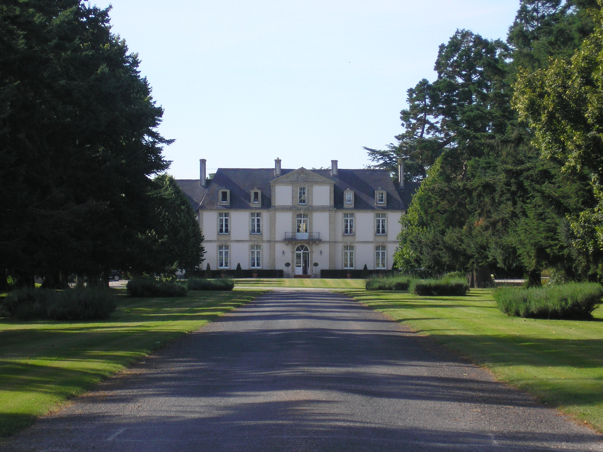 Sully (Normandie, France). Le château.